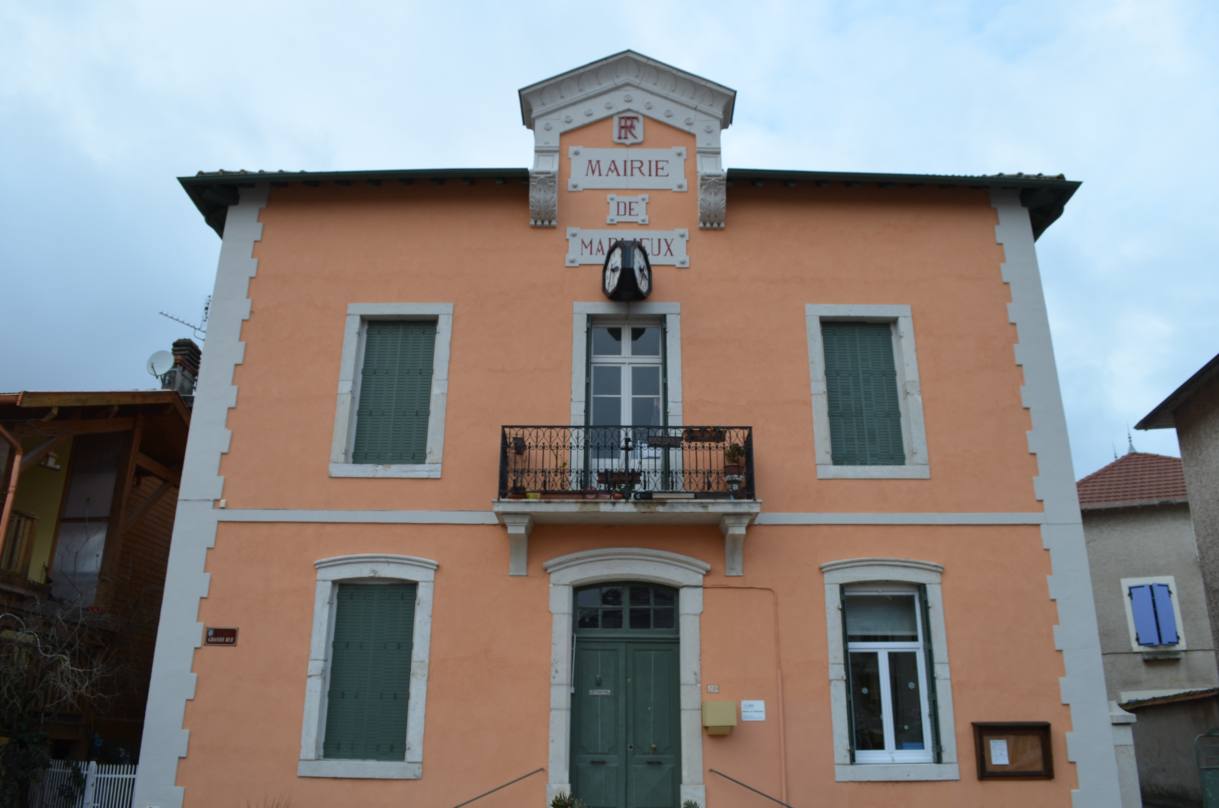 Ancienne mairie de Marlieux.